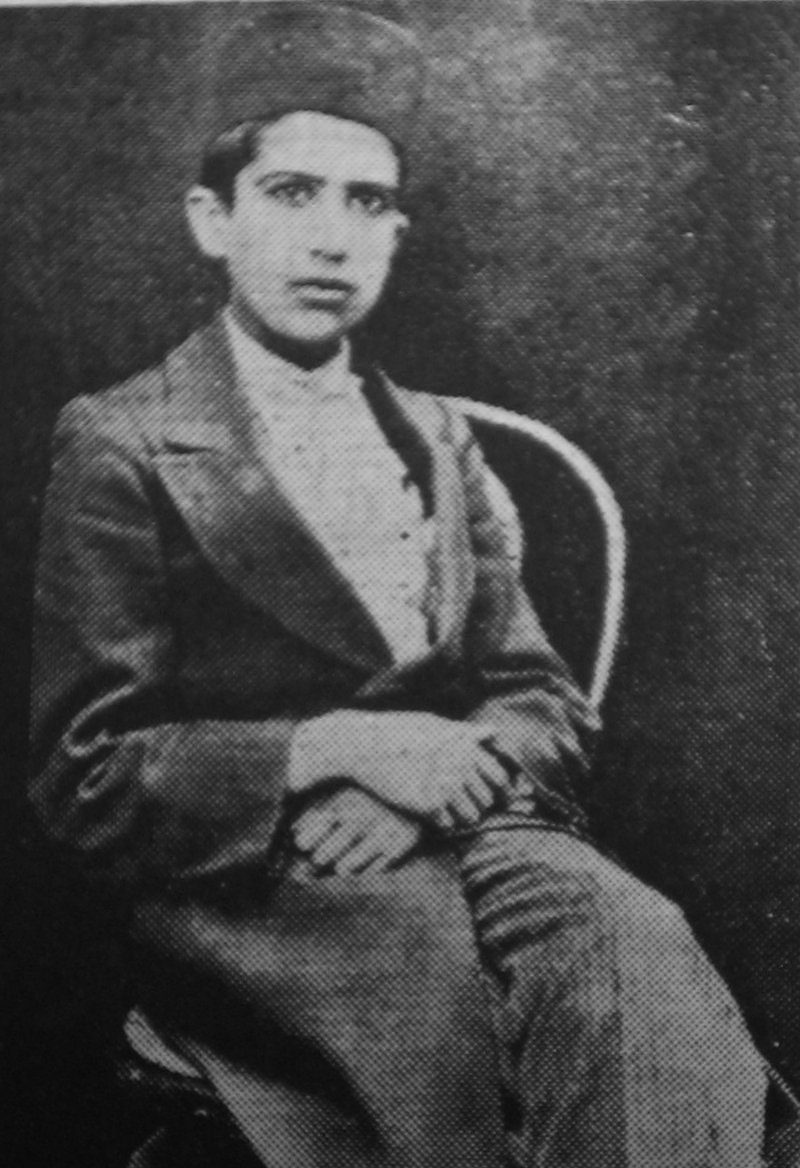 Ruhollah Khaleghi روح‌الله خالقی